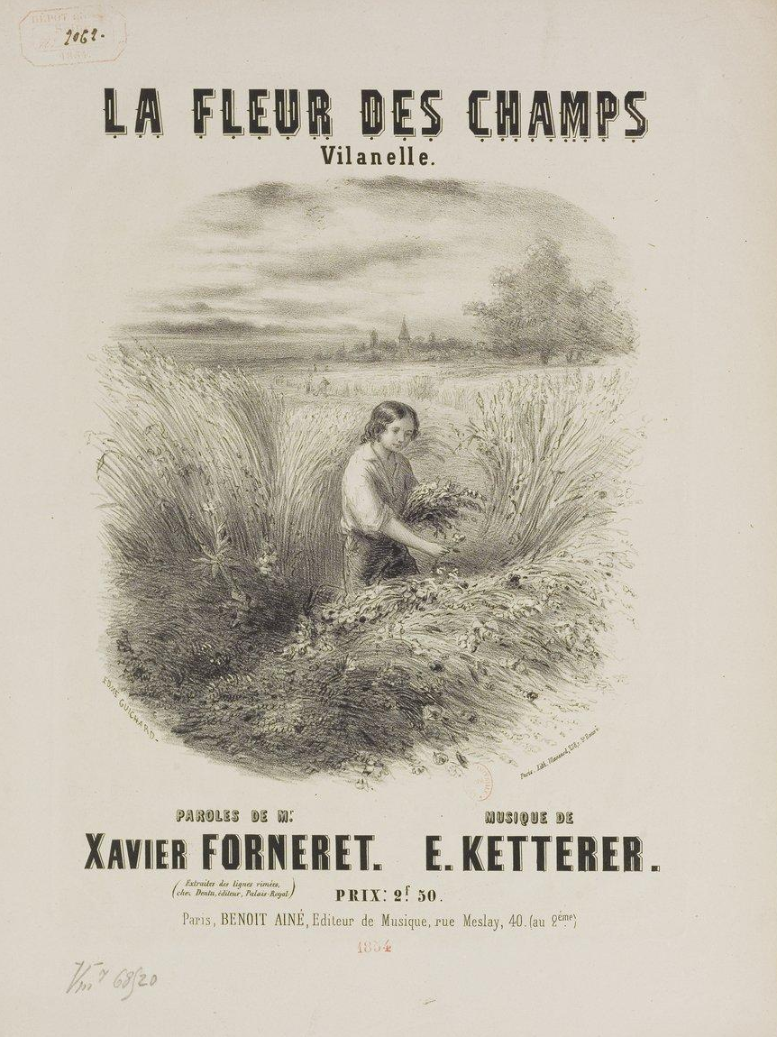 Forneret Ketterer - La fleur des champs